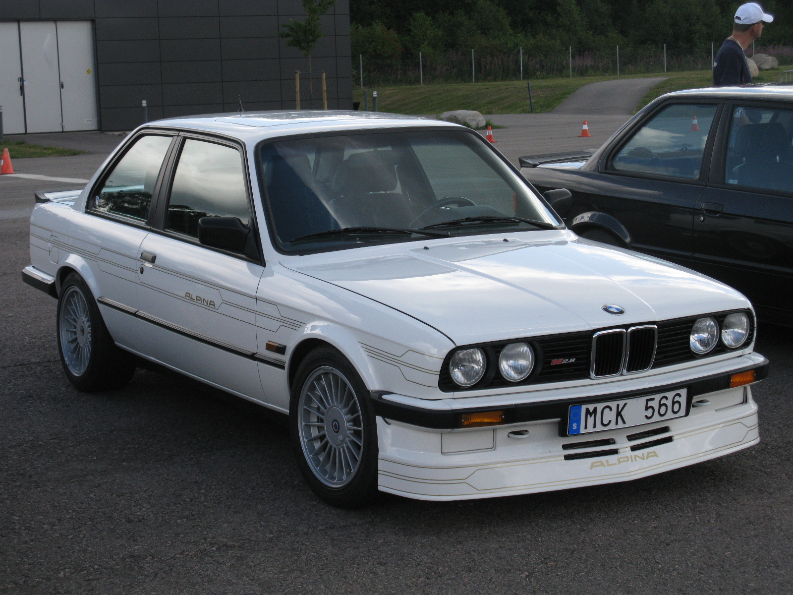 BMW Alpina B6 2.8 E30